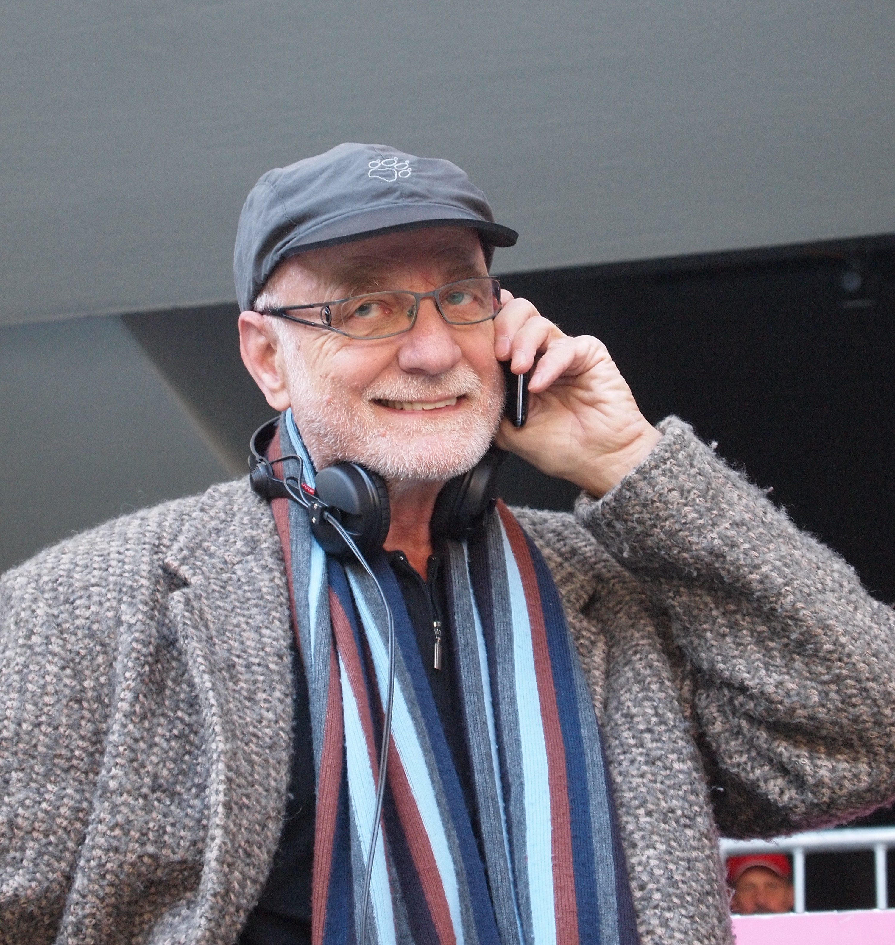 Günther Koch in der Arena in München